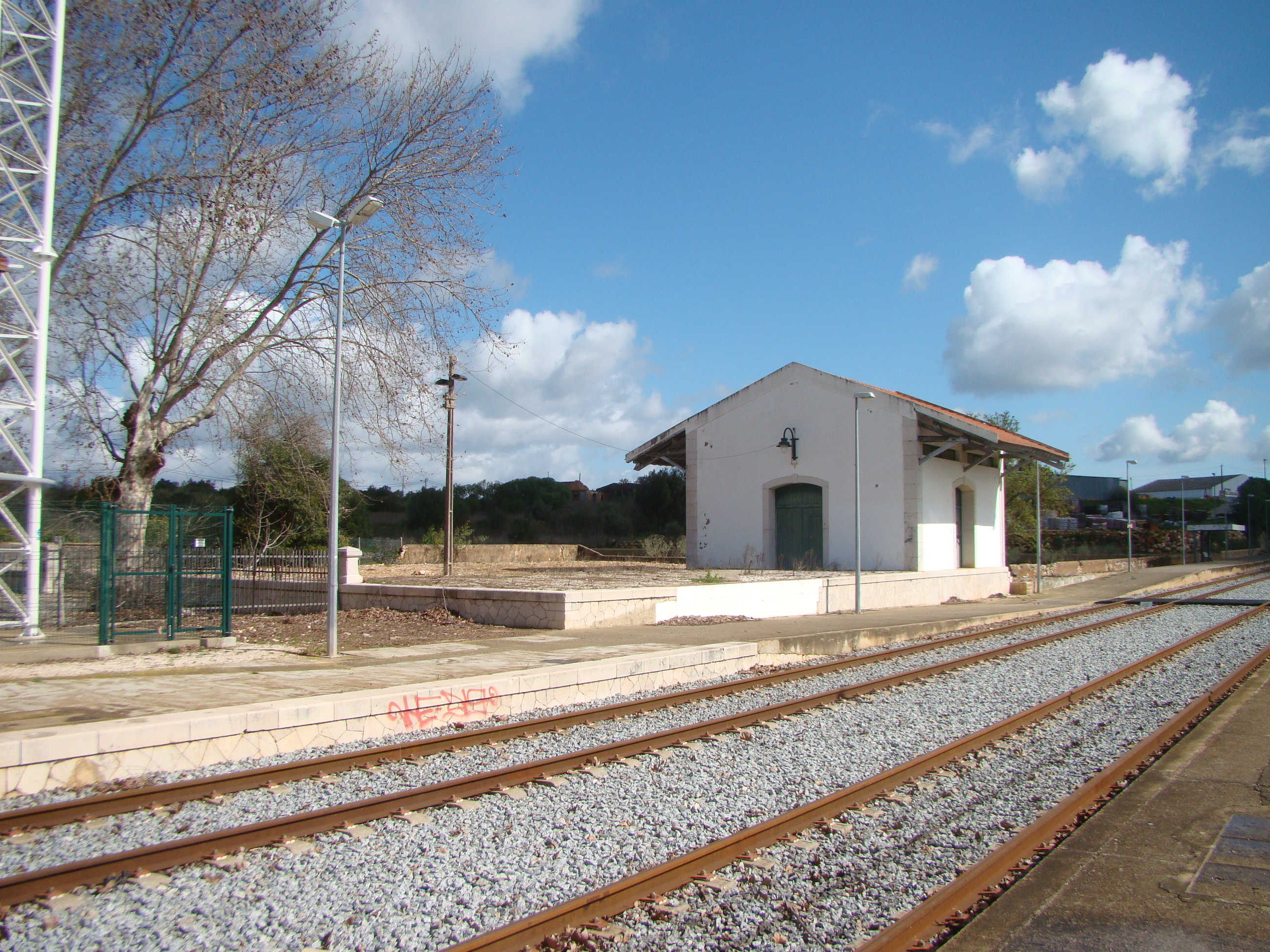 Gare de Mexilhoeira Grande - cais de mercadorias 03/2018.